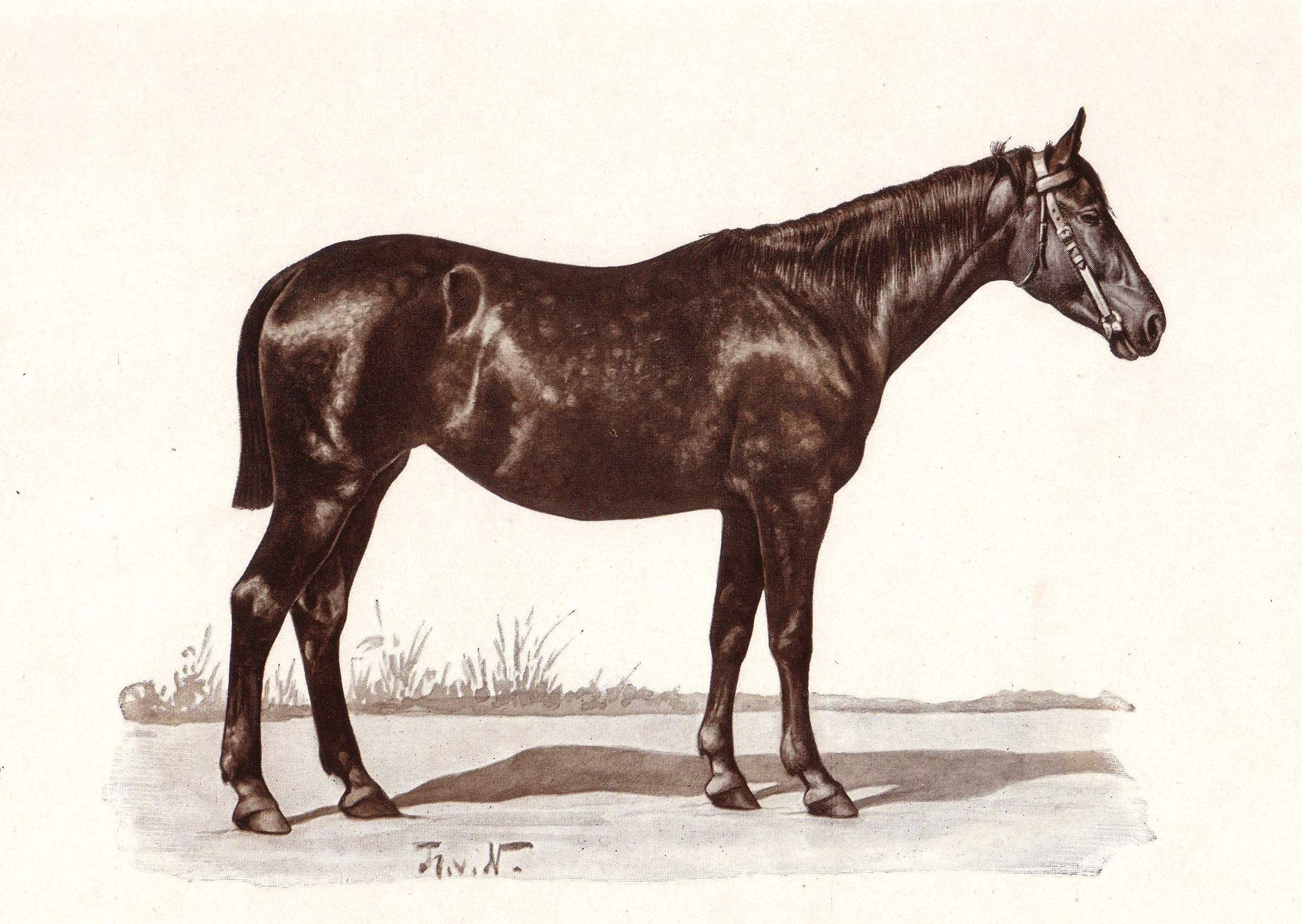 Ostpreusse, Fuchsstute "Sonne", geb, 1889 in Weedern (Ostpreussen) (Die auf Trakehnen selbst geborenen Pferde wurden Trakehner genannt, die Pferde aus Privatzucht derselben Rasse wurden Ostpreußen genannt.)